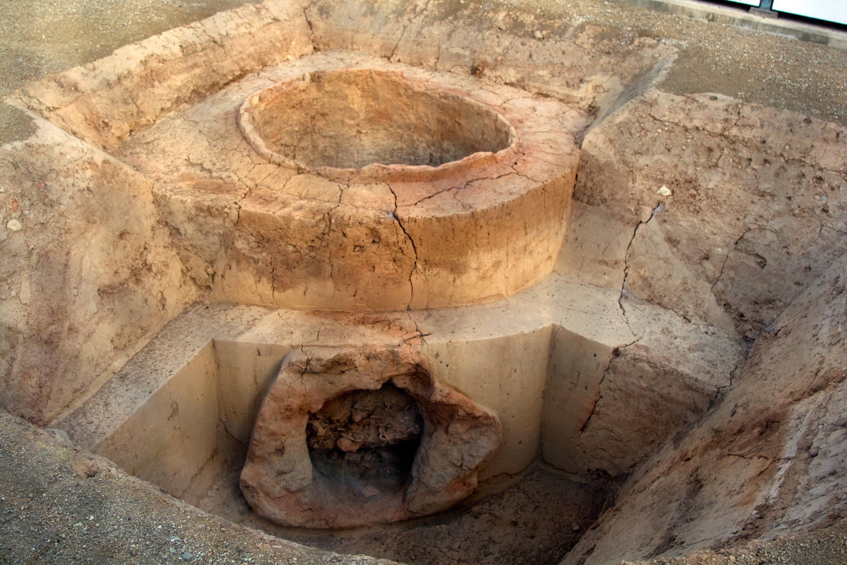 Römischer Töpferofen aus der Zivilsiedlung in Mainz-Weisenau.